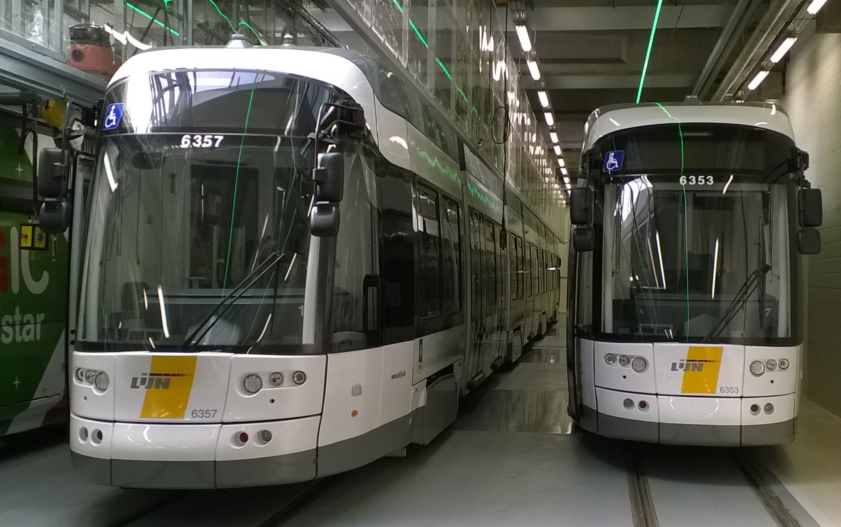 Albatrostrams van De Lijn in de werkplaats van Gentbrugge